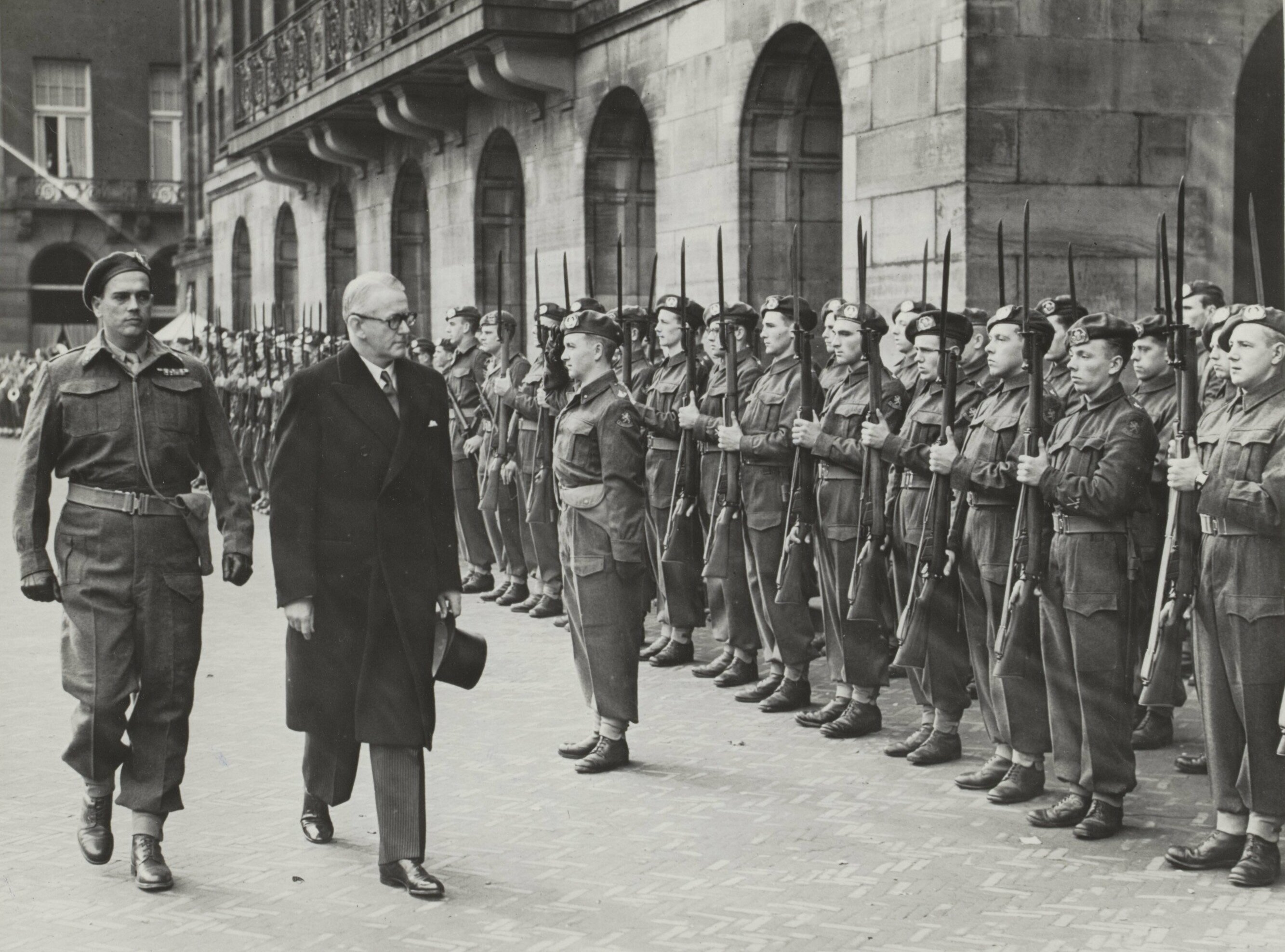 Collectie / Archief : Fotocollectie Elsevier Reportage / Serie : [ onbekend ] Beschrijving : Alfred Stirling, de nieuw benoemde Australische ambassadeur in Den Haag heeft op het Paleis op de Dam te Amsterdam aan koningin Juliana zijn geloofsbrieven aangeboden. Inspectie van de erewacht voor het paleis Annotatie : Datering op achterzijde foto is een dag later dan in fotoadministratie Anefo Datum : 9 oktober 1950 Locatie : Amsterdam Trefwoorden : aanbiedingen, ambassadeurs, erewachten Persoonsnaam : Stirling, Alfred Instellingsnaam : Paleis op de Dam Fotograaf : Noske, J.D. / Anefo Auteursrechthebbende : Nationaal Archief Materiaalsoort : Foto (zwart/wit) Nummer archiefinventaris : bekijk toegang 2.24.05.02 Bestanddeelnummer : 092-0978